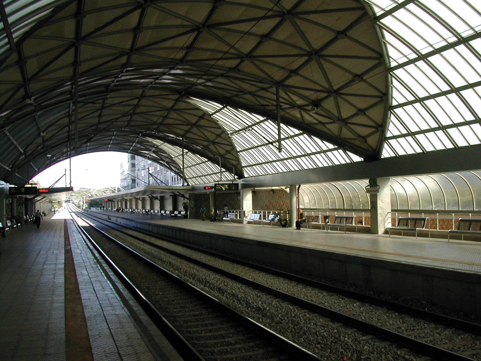 Estação ferroviária de Rio de Mouro, Linha de Sintra, Portugal